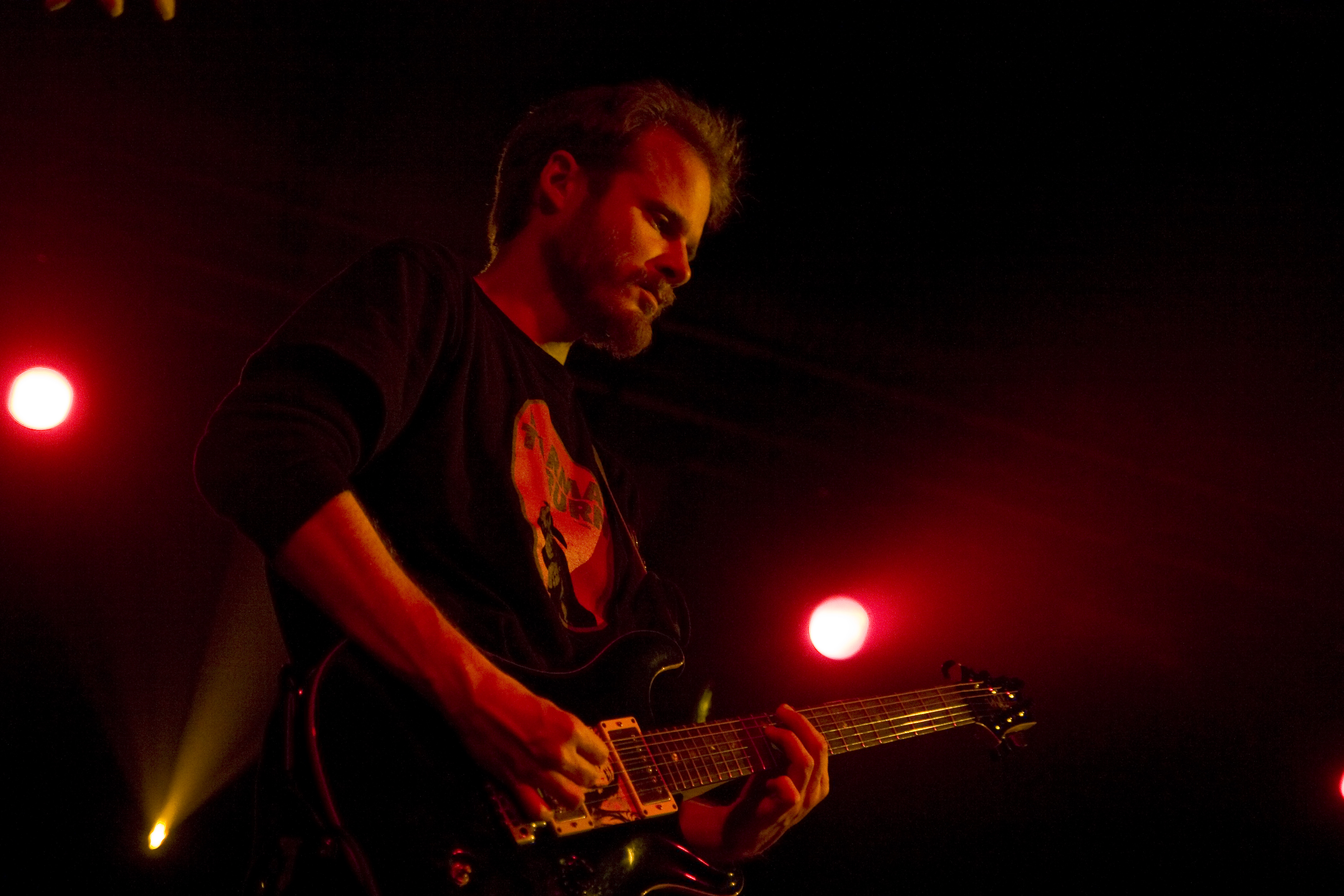 Foto: Rosario López